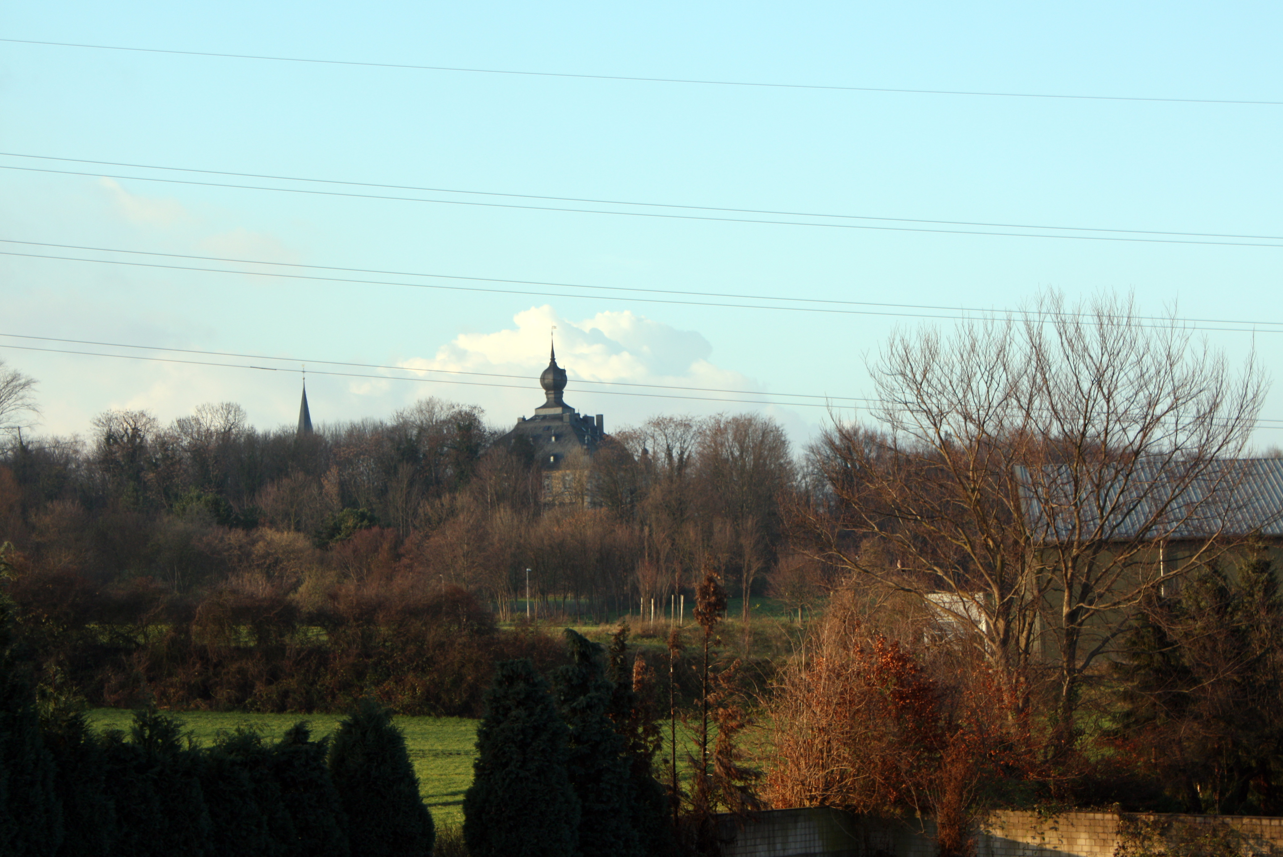 Hürth-Fischenich, Blick nach Kendenich